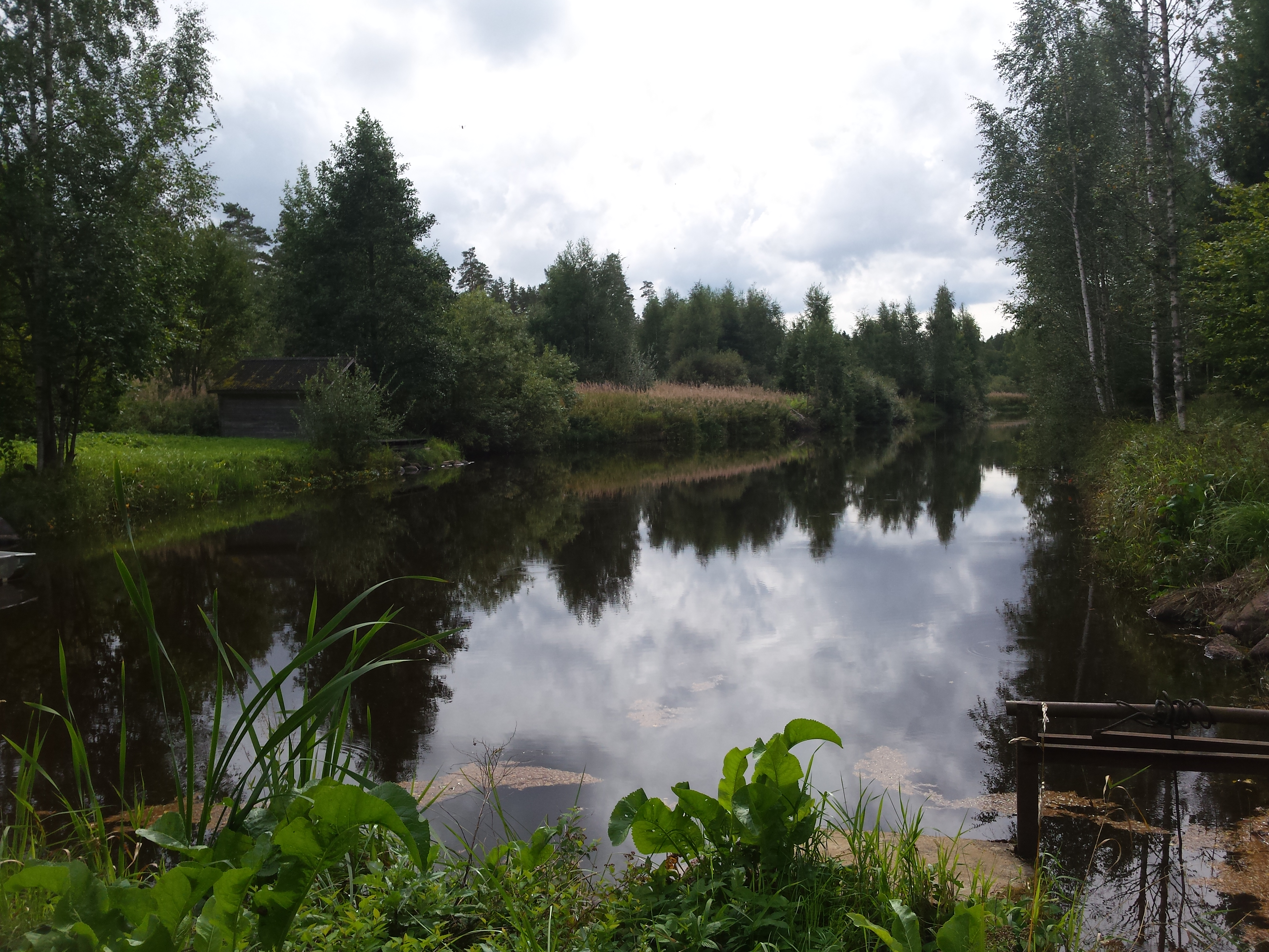 Kemba paisjärv